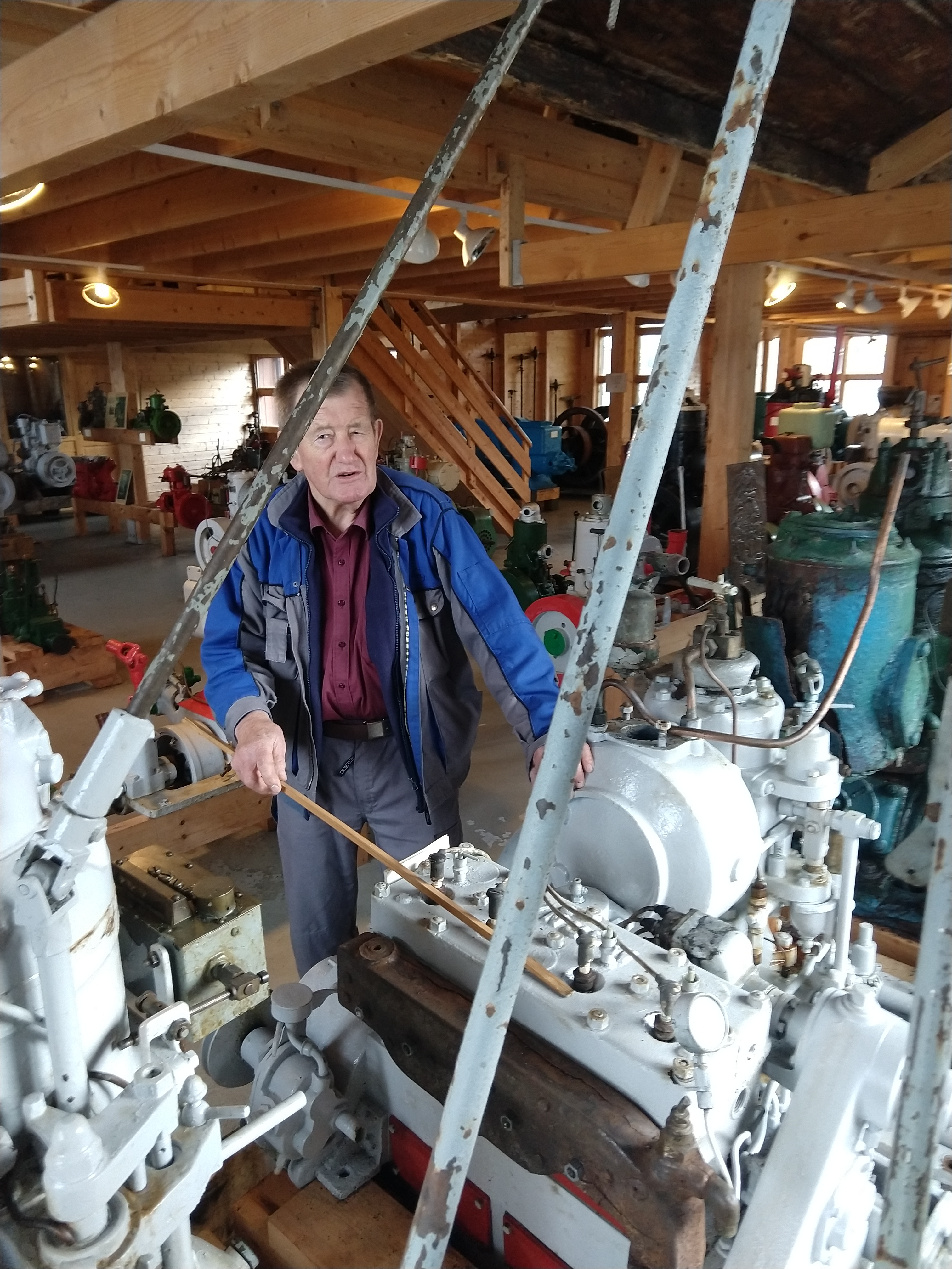 Kristian Otterskred fortel om samlinga si på Kristianhus mueum.